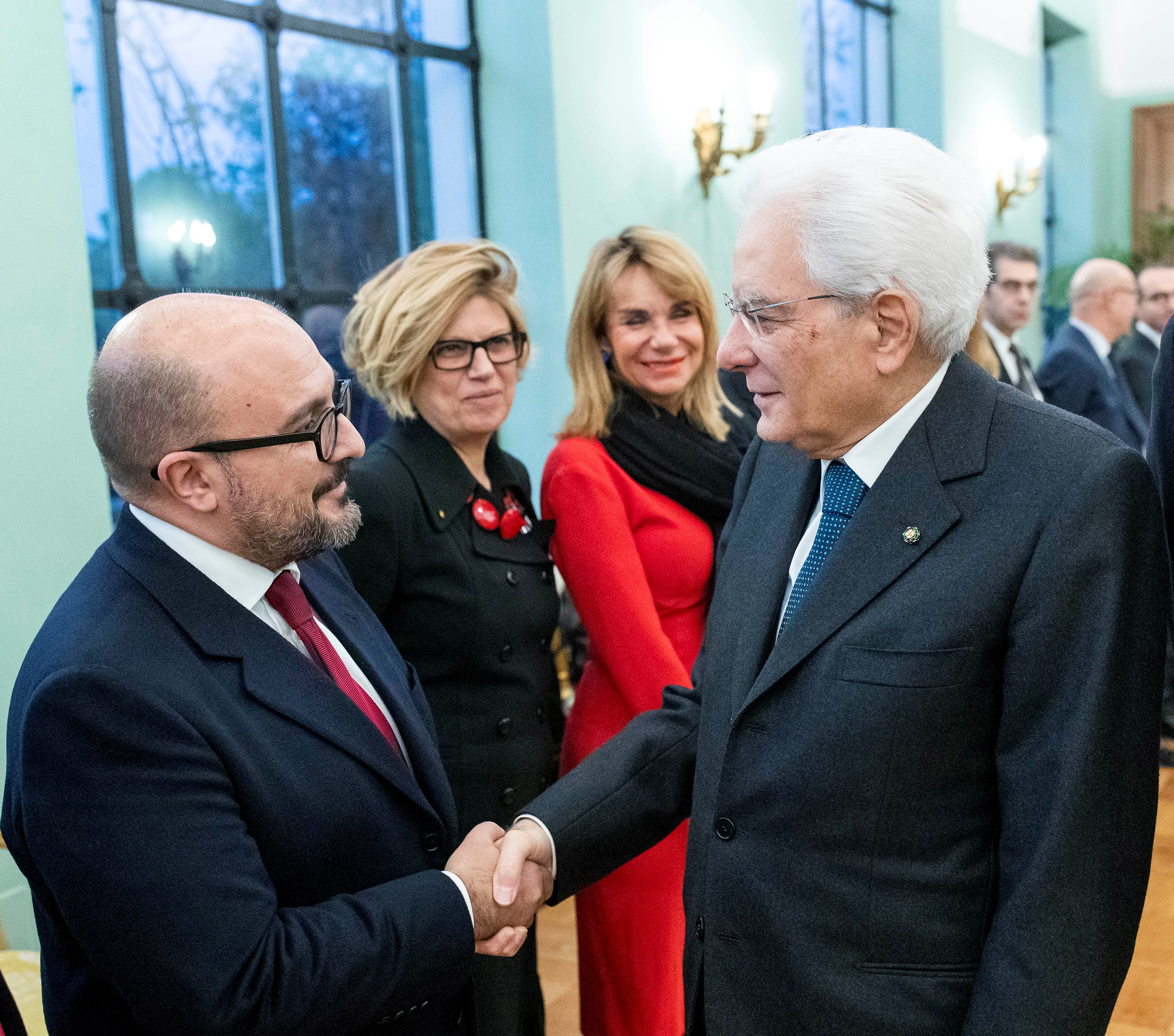 Gennaro Sangiuliano con il Presidente della Repubblica Sergio Mattarella